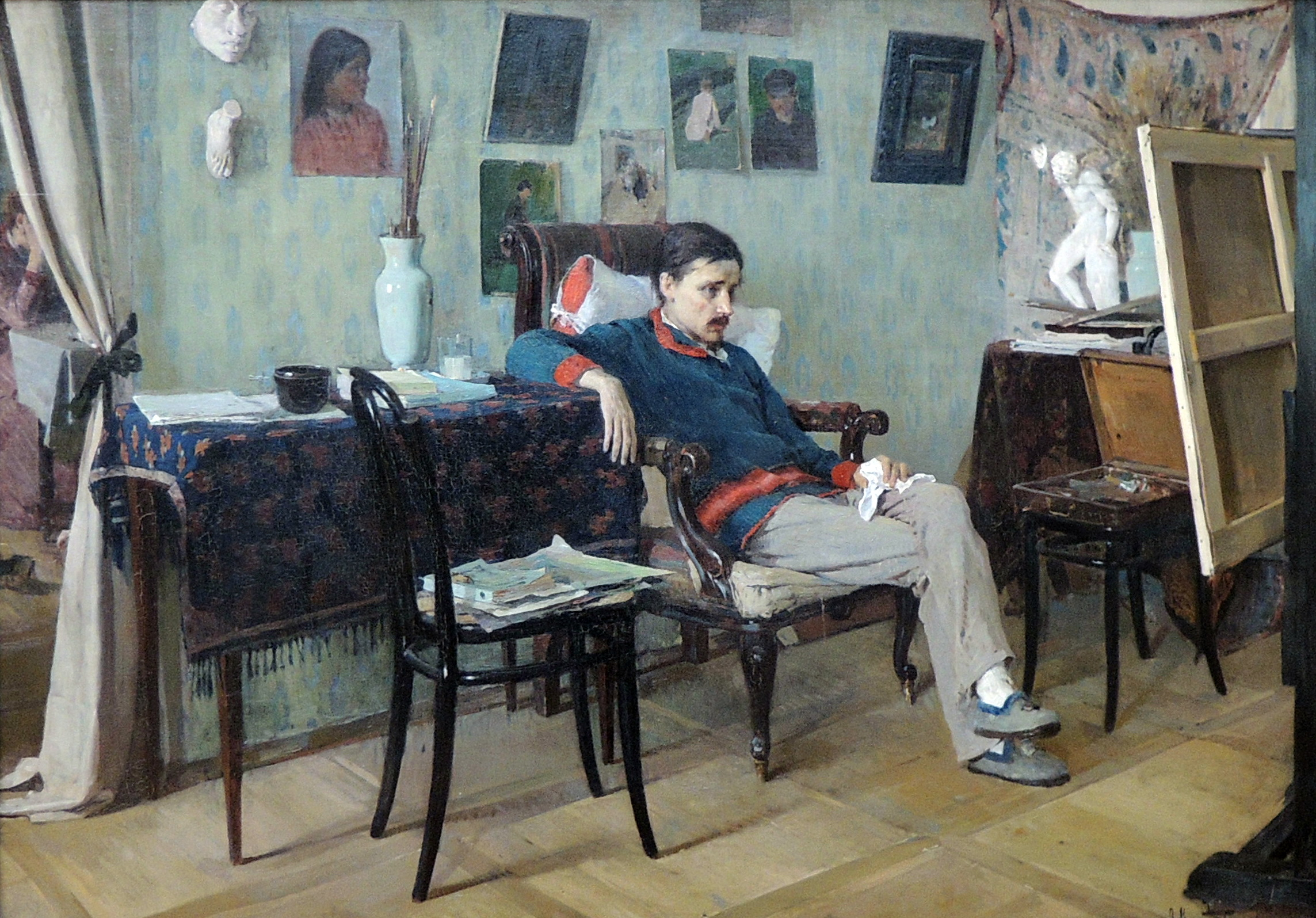 Ill painterlabel QS:Lde,"kranker Maler"label QS:Len,"Ill painter"label QS:Lru,"Больной художник."